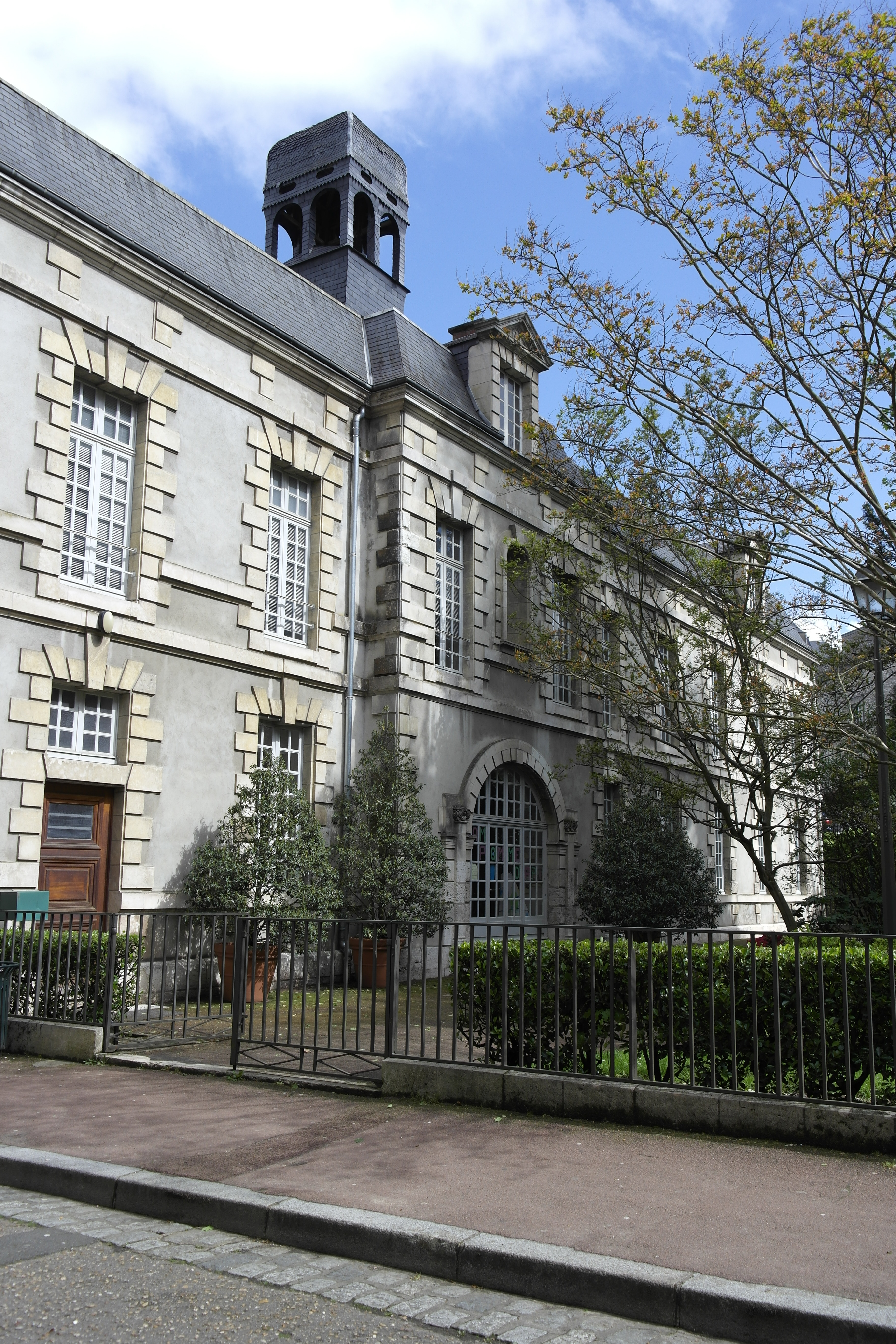 Restes de l'ancien collège jésuite de Blois. Il abrite aujourd'hui la Poste du château.